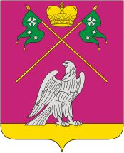 Герб Высклковского района